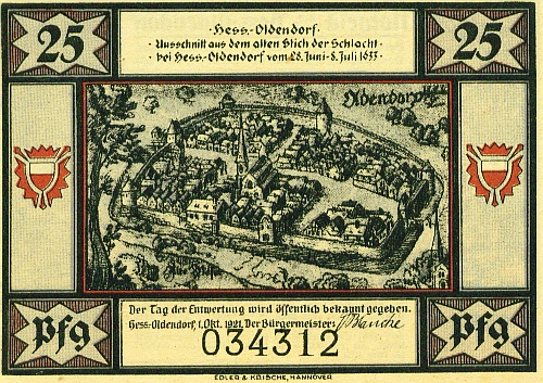 Notgeld (25 Pfg.) der Stadt Hessisch Oldendorf vom 01.10.1921, zeigt "Ausschnitt aus dem alten Stich der Schlacht bei Hess.-Oldendorf vom 28. Juni - 8. Juli 1633". Das Notgeld wurde vom damaligen Bürgermeister Dr. Ernst A. Blancke (Bürgermeister Hess. Oldendorf 1920-1945) unterschrieben (Anmerkung vom Enkel Peter Blancke). Quelle: Privatbesitz